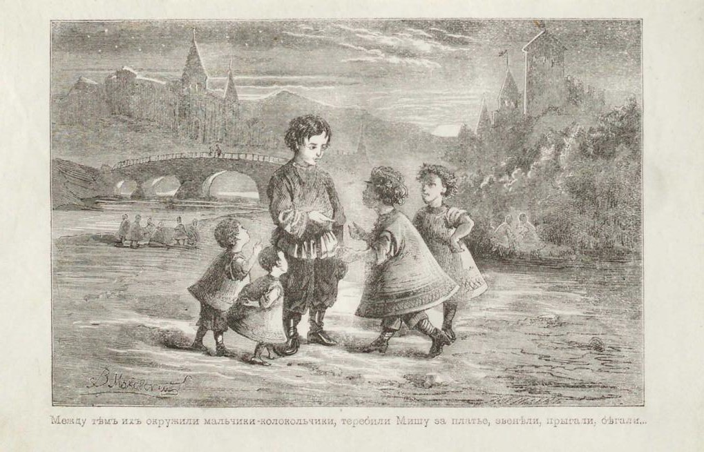 Иллюстрация к сказке "Городок в табакерке" В. Ф. Одоевского (издание 1871 года); рисовал В.Е. Маковский, гравировал на дереве Ю.Э. Конден